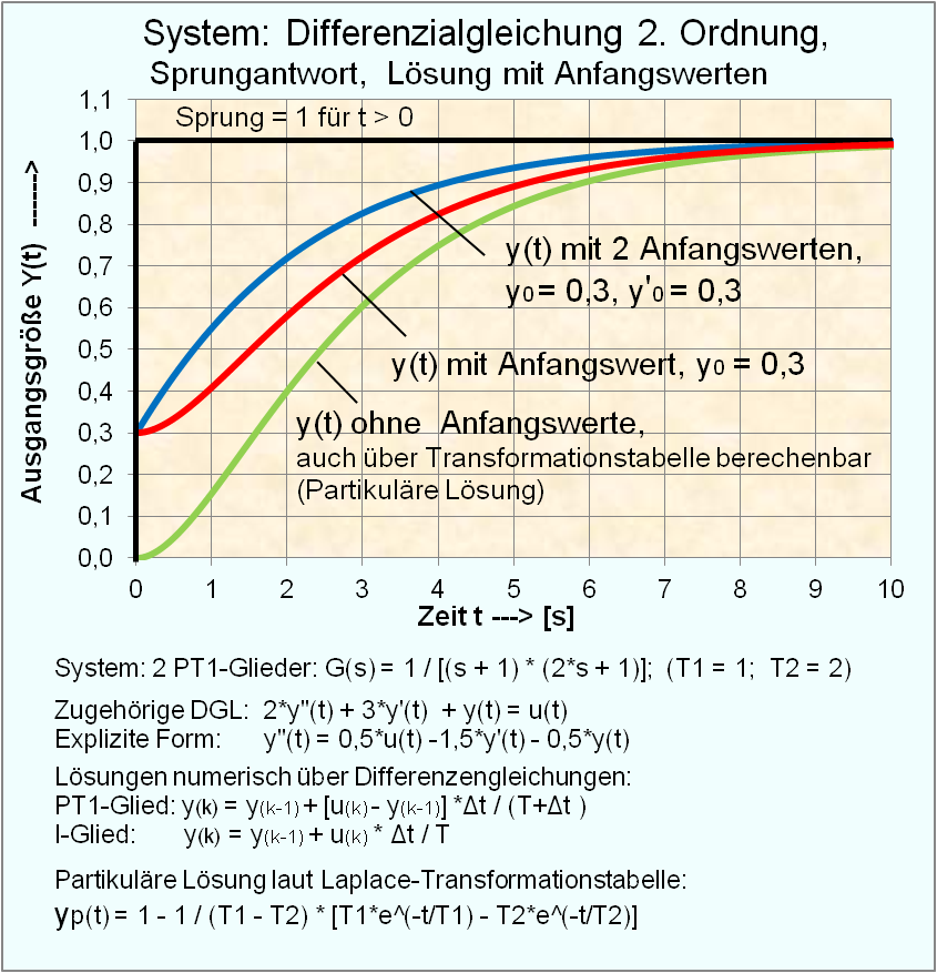 Grafische Darstellung der Sprungantwort eines dynamischen Übertragungssystems höherer Ordnung mit Anfangswerten.